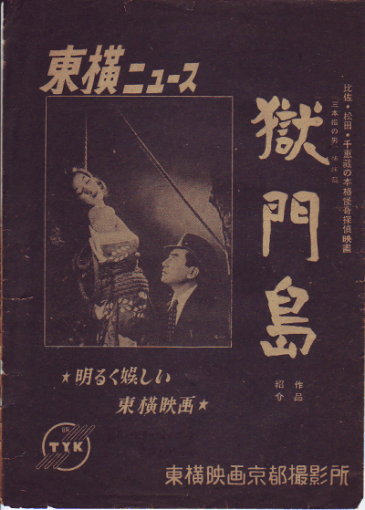 『獄門島』プレスシート、東横映画、1949年